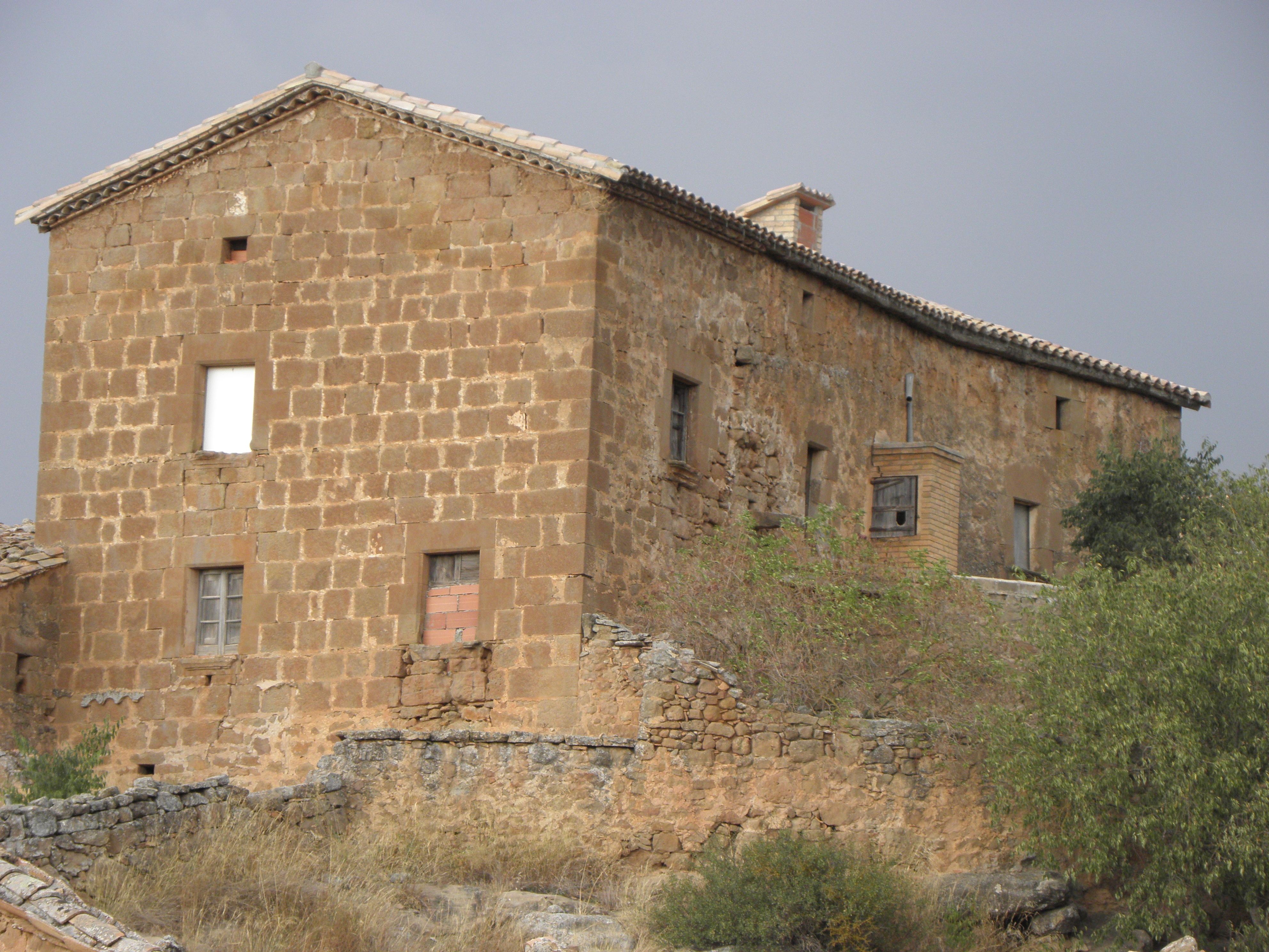 La masia de Cal Batlle, al poble de Sallent (Pinell de Solsonès). Les façanes sud i est.